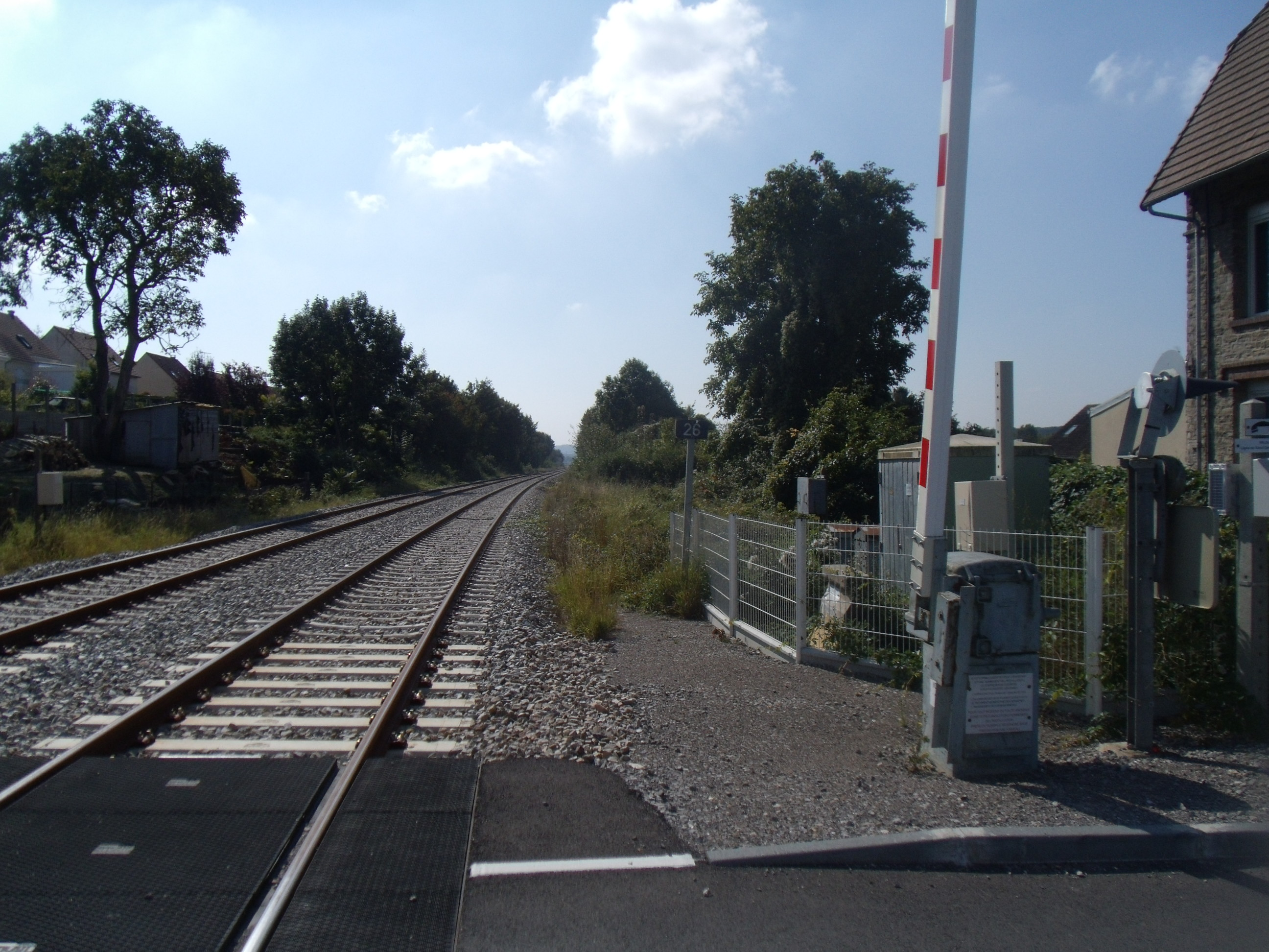 Ce qu'il reste de la Gare d'Éragny - Bazincourt (02) en septembre 2014. Les voies rénovées en direction de Gisors. Photo prise au PN 26.